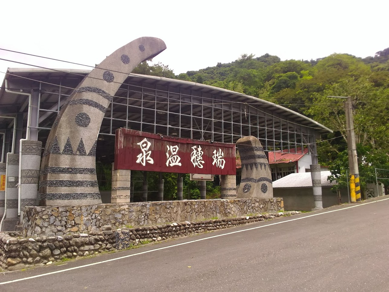 瑞穂温泉入り口